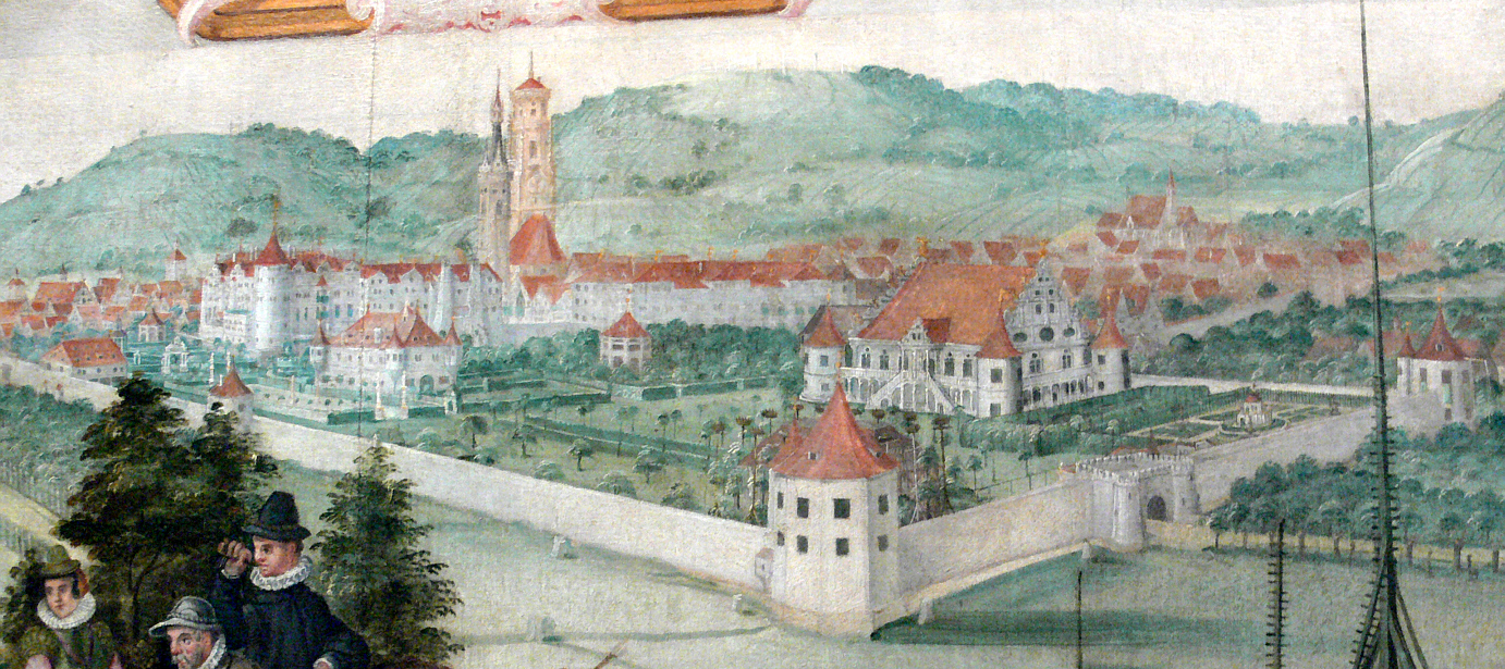 Das neue Lusthaus in Stuttgart, 1589 Ausschnitt aus der Landtafel des Stuttgarter Amtes von Hans Steiner und Georg Gadner, ursprünglich im Festsaal des abgebildeten Lusthauses; Öl auf Leinwand; jetzt Württembergisches Landesmuseum Stuttgart; E 750